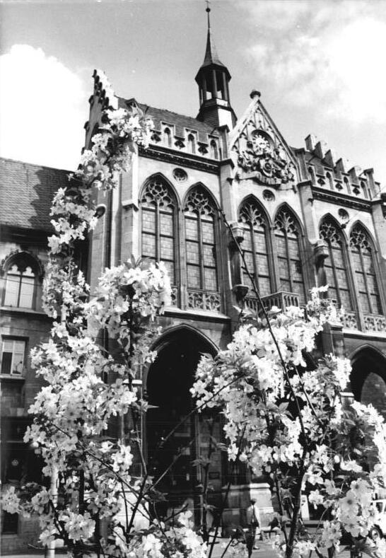 ADN-ZB-Hirndorf-22.4.1988-Erfurt: Frühling, dass sind auch Kirschbäumchen im vollen Blütenschmuck. Vor dem Erfurter Rathaus erfreuen sie das Auge der Vorübergehenden.